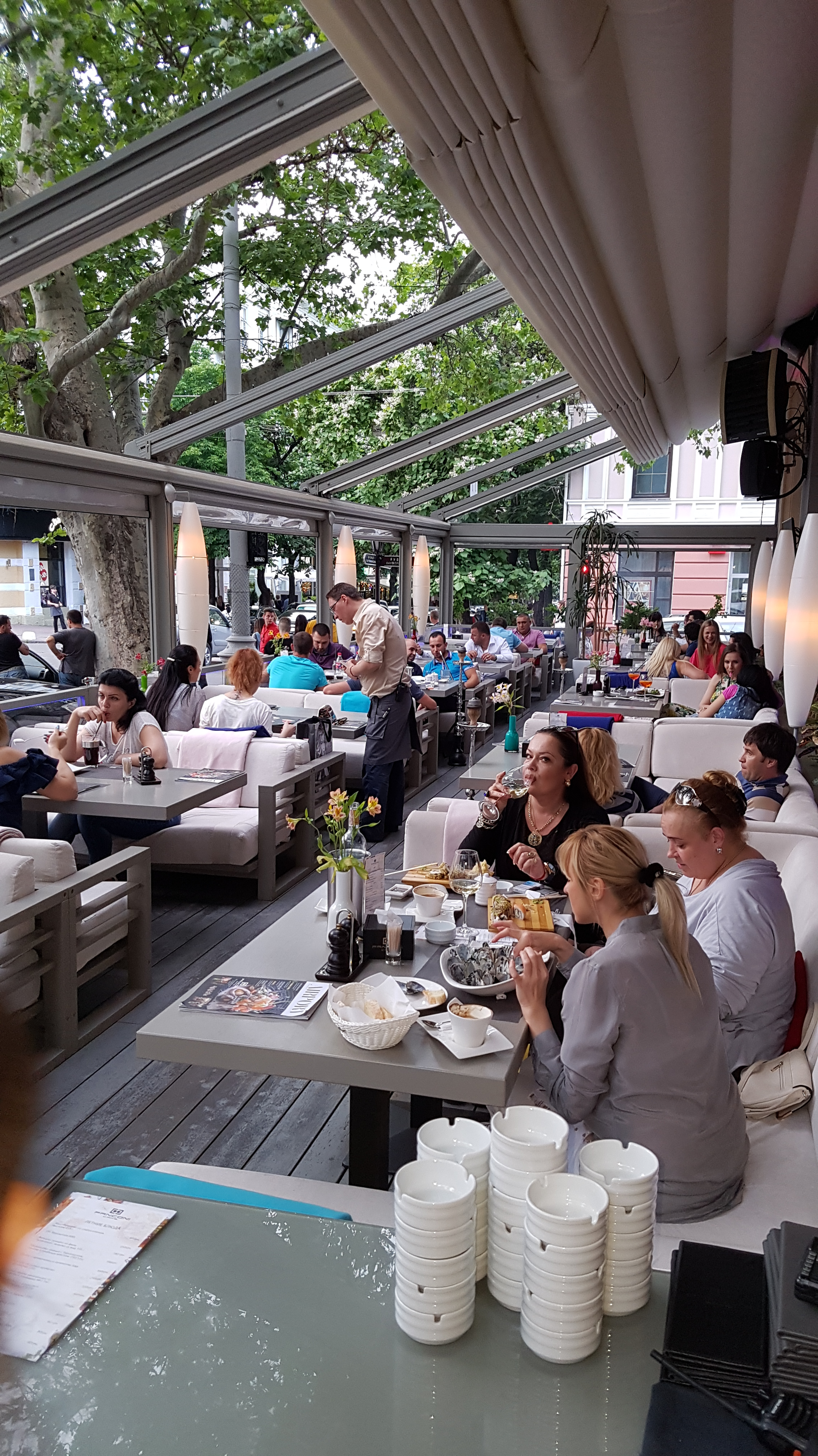 фото террасы кафе Fanconi